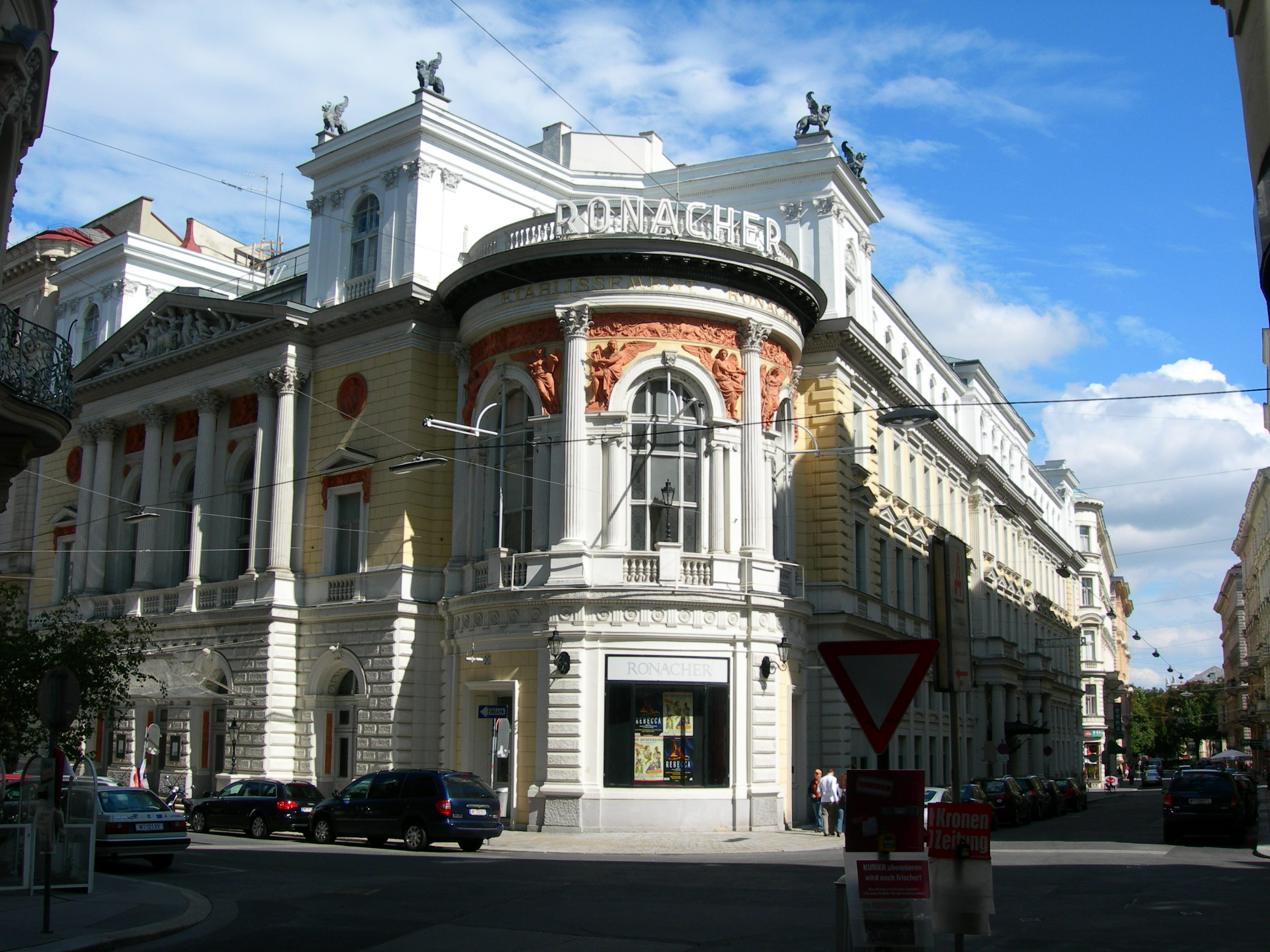 Das Etablissement Ronacher ist ein Theater im 1. Wiener Gemeindebezirk (Innere Stadt), gelegen zwischen Himmelpfortgasse, Seilerstätte und Schellinggasse.